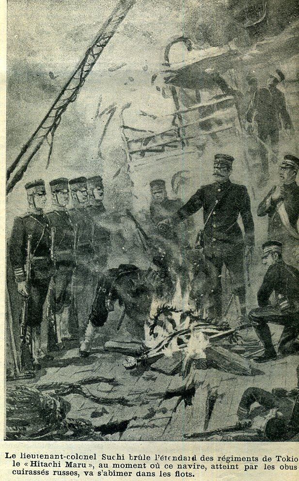 see picture